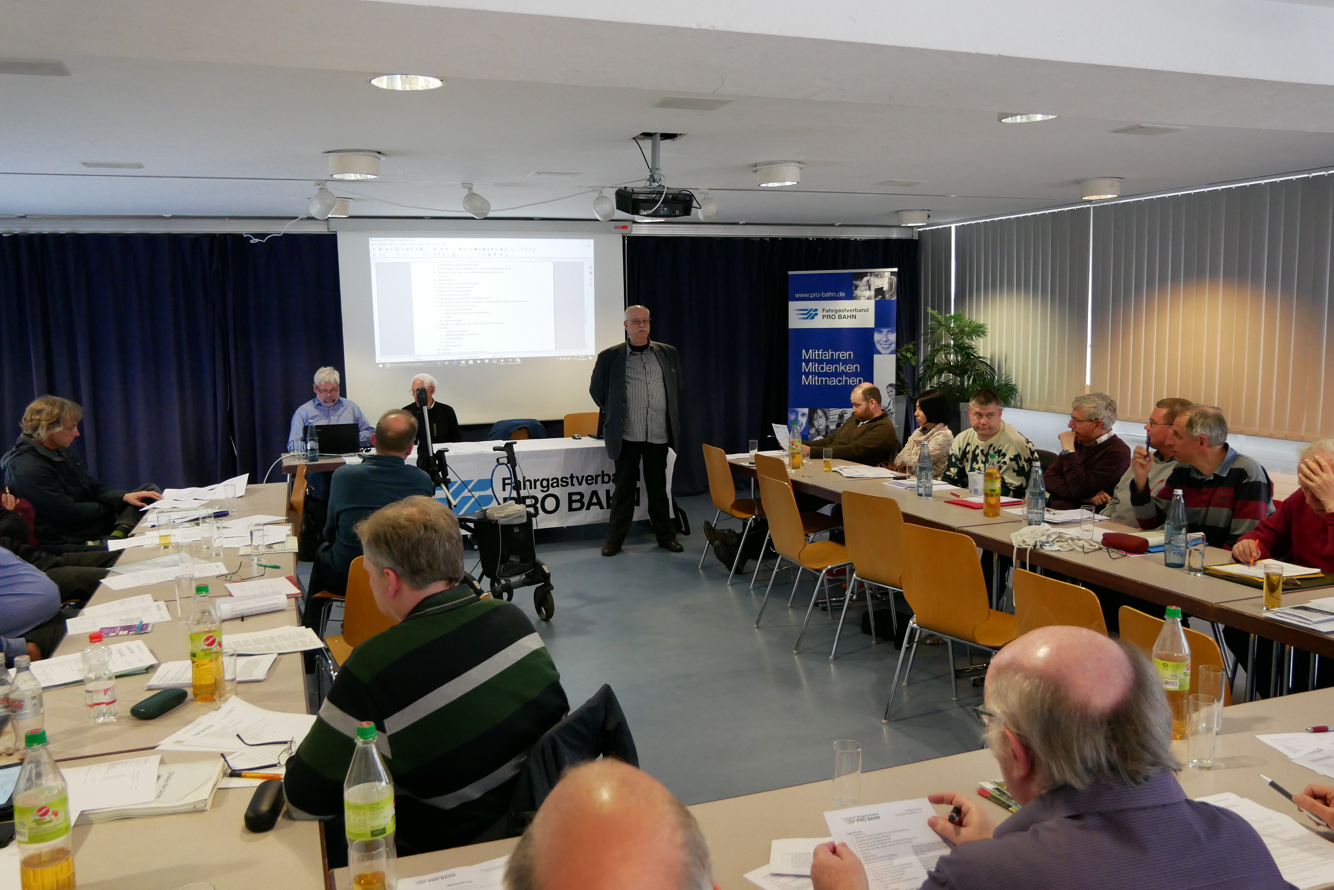 Der Bundesvorsitzende des Fahrgastverbandes PRO BAHN Detlef Neuß auf der Hauptversammlung des Landesverbandes Nordrhein Westfalen im Bürgerzentrum Köln-Deutz (22. April 2017).